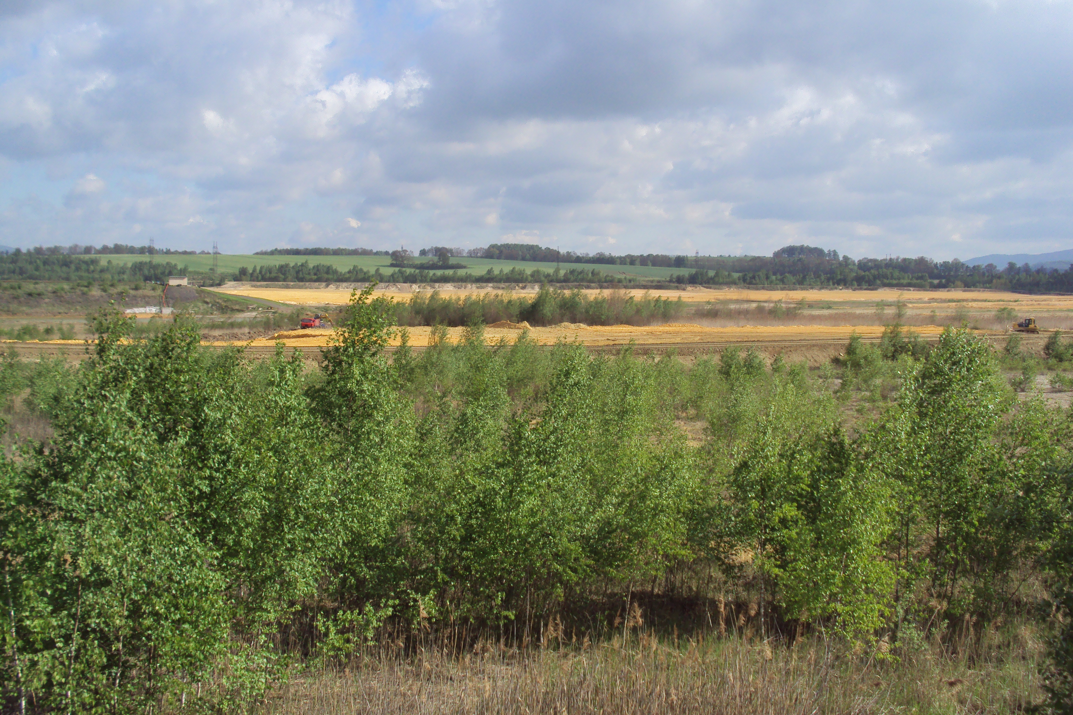 Usazovací nádrž, odkaliště u uranových dolů v sousedství města Stráž pod Ralskem